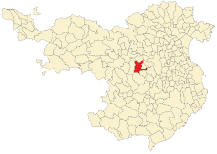 Situación de Porqueres en la provincia de Gerona.